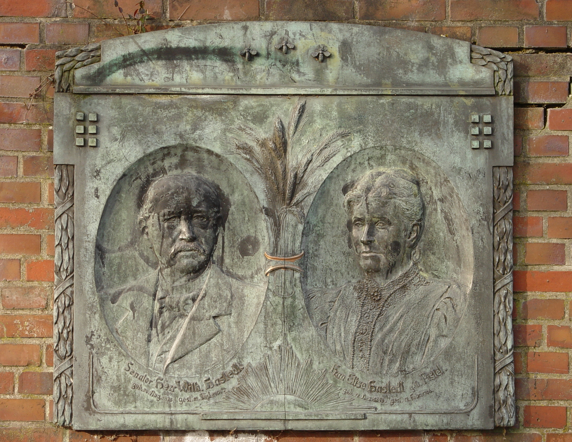 Hamburg, Bezirk Harburg, Stadtteil Eißendorf, Gazertstraße 58, Gedenktafel für Wilhelm Hastedt und Elise HastedtThis is a photograph of an architectural monument.